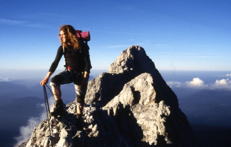 Abends unterwegs am Watzmanngrat. Zwischen Mittel- und Südspitze führt der Weg teilweise direkt über die ausgesetzte Gratschneide.